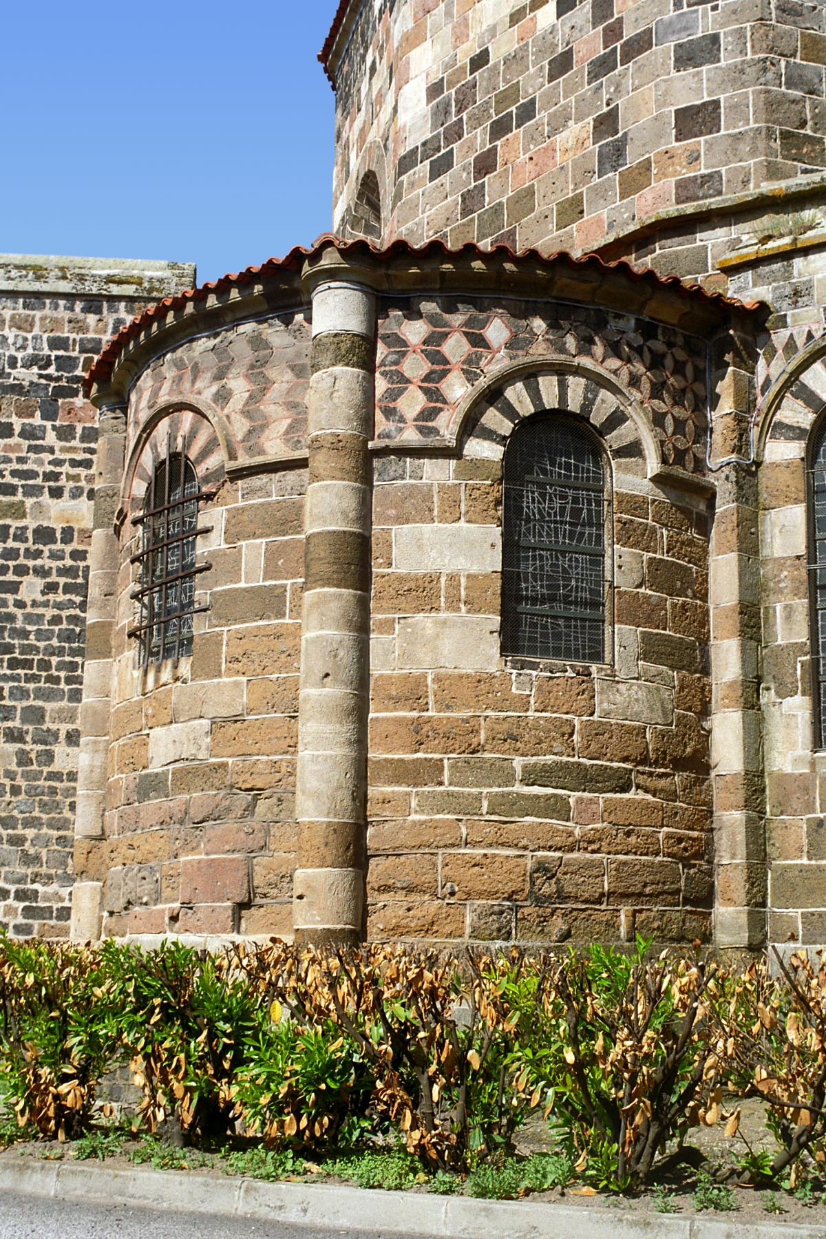 France - Velay - Église Saint-Georges de Saint-Paulien